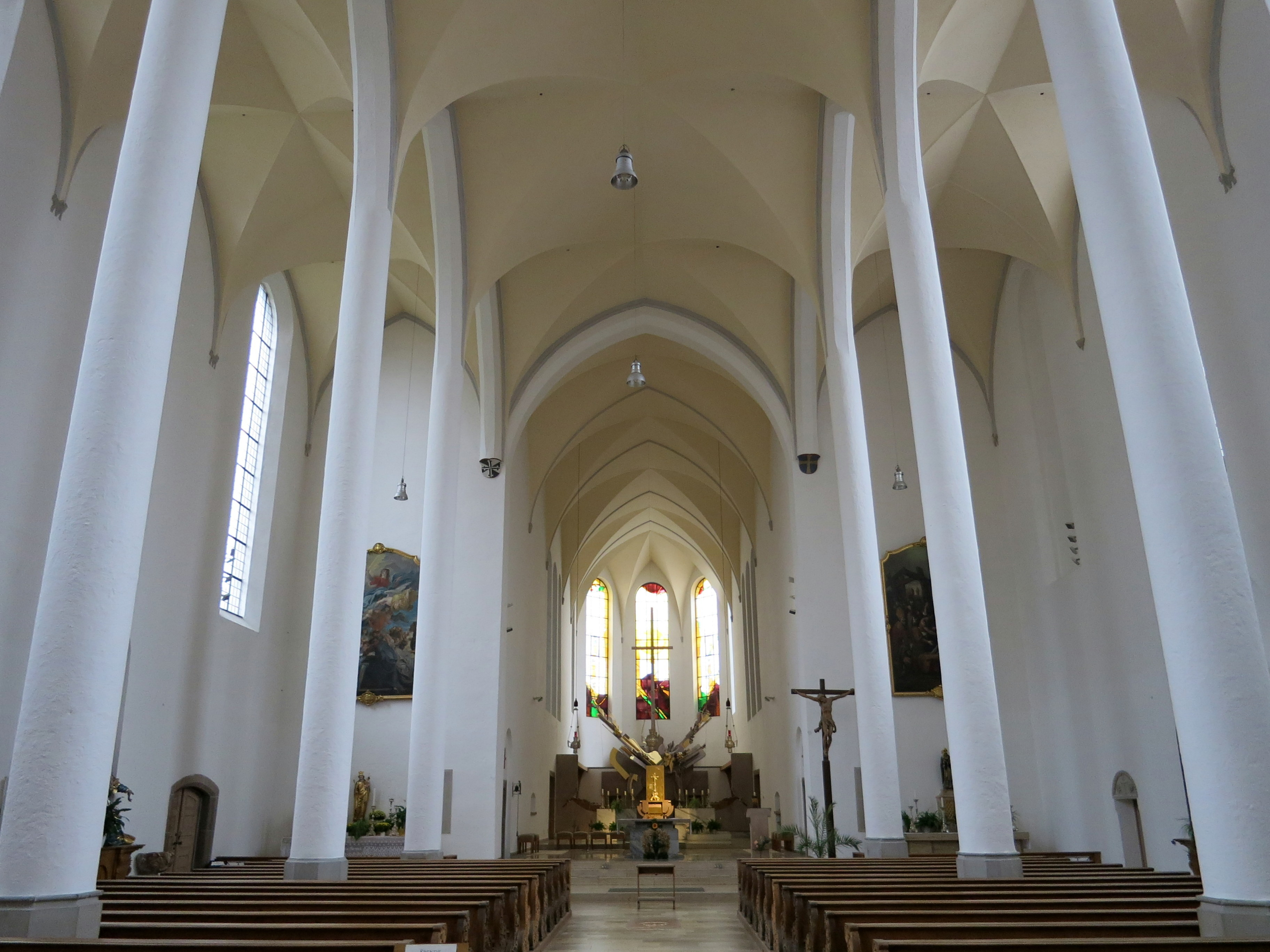 Chor mit Altar von Hans Ladner in der Heilig-Kreuz-Kirche Augsburg